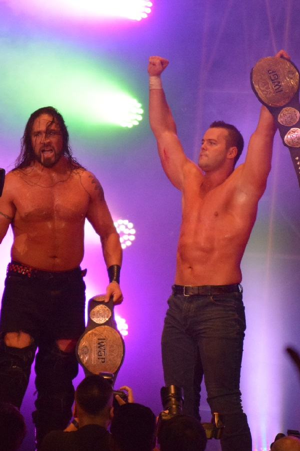 2017年9月24日 ワールド記念ホール「DESTRUCTION in KOBE」 キラー・エリート・スクワッド（ランス・アーチャー & デイビーボーイ・スミス・ジュニア）